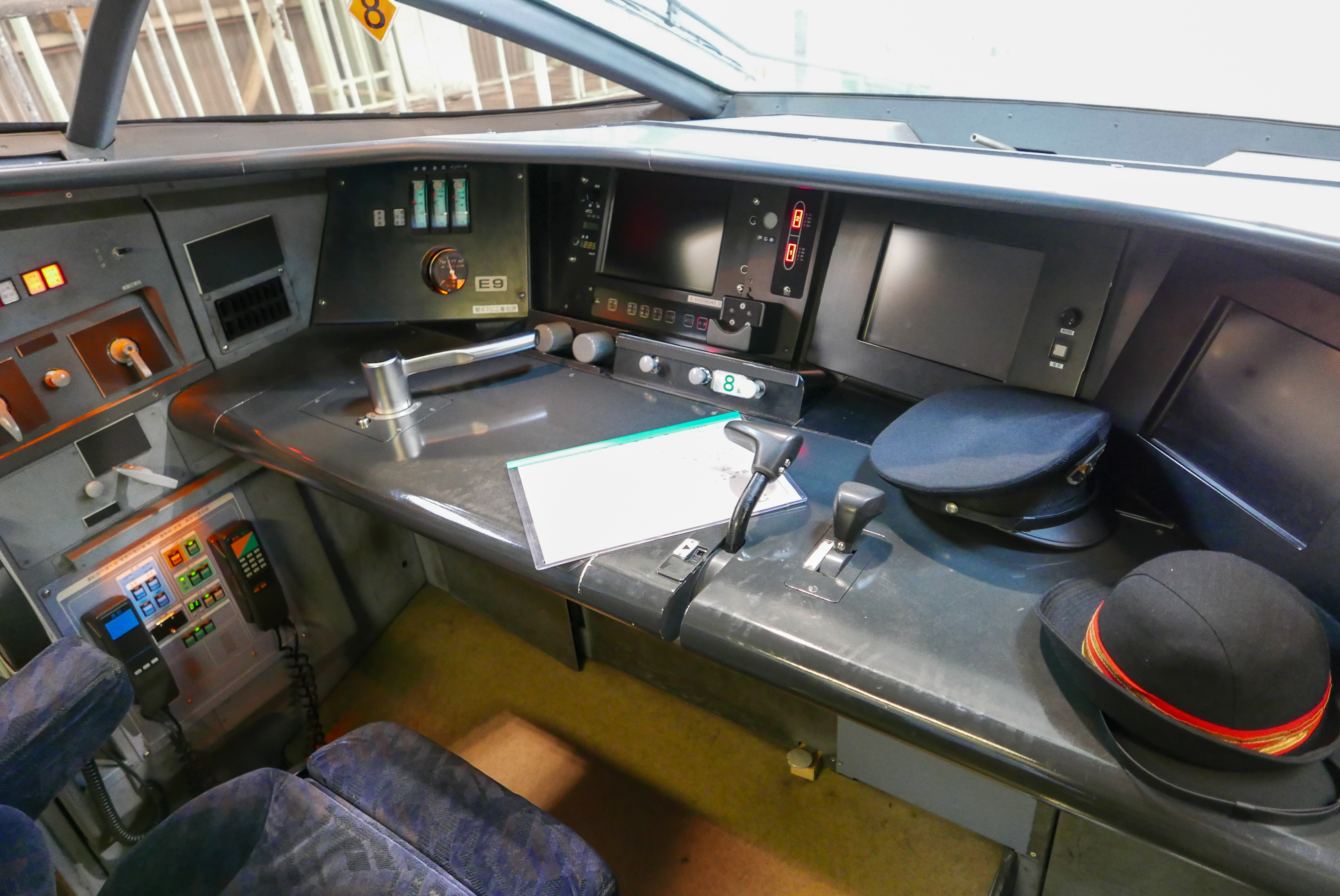 700系7000番台（E編成）運転台 （E9編成、724-7509、1次車、日立製作所製） 博多総合車両所公開イベントにて、許可を得て撮影。